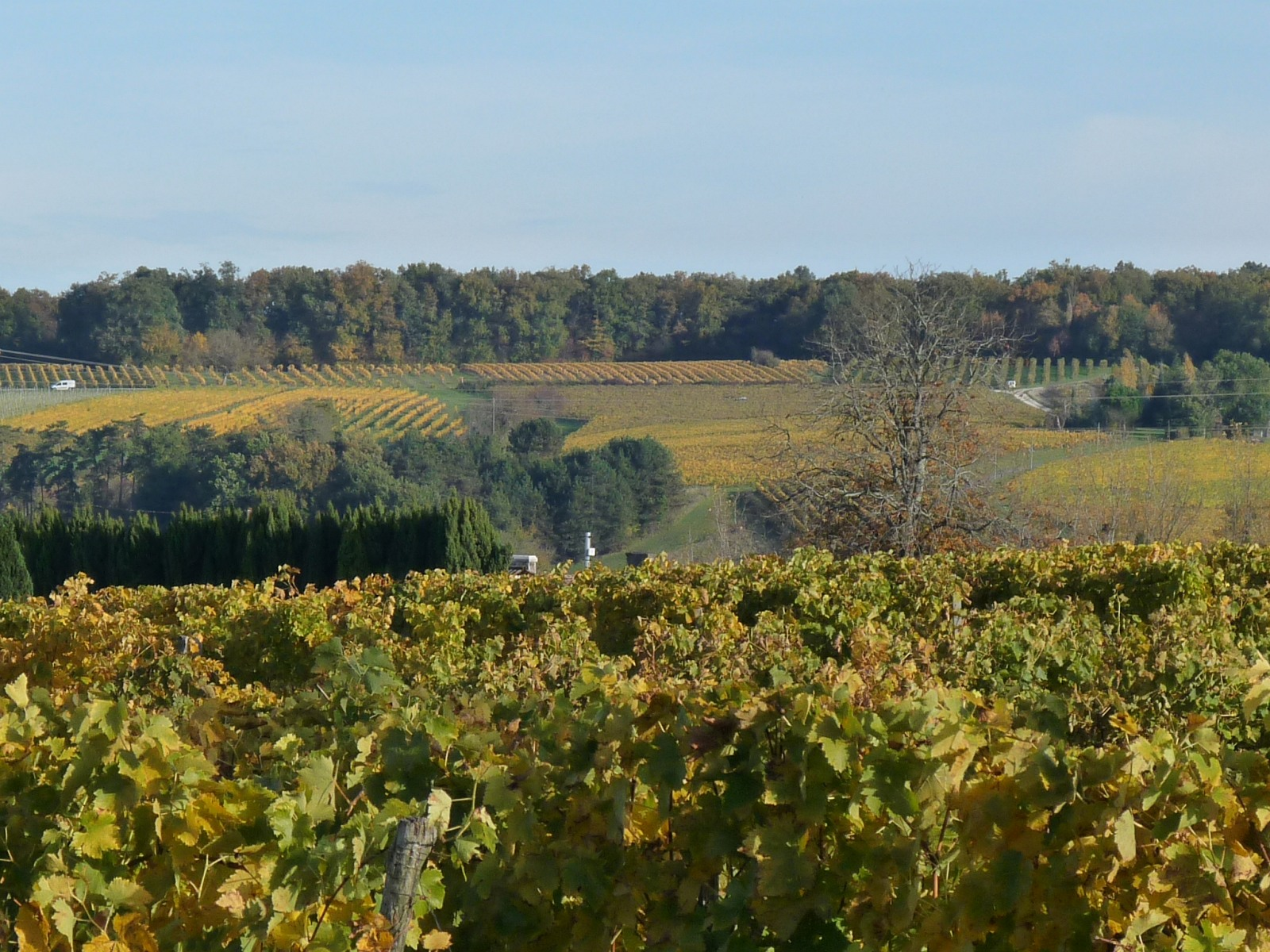 Vignoble de Grande Champagne, entre Bonneuil et Sonneville (Lignières-Sonneville), Charente, France